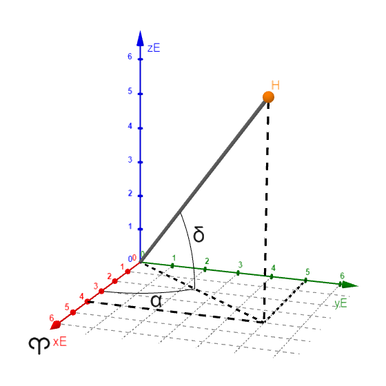 Equatorial coordinate system, RA and Dec